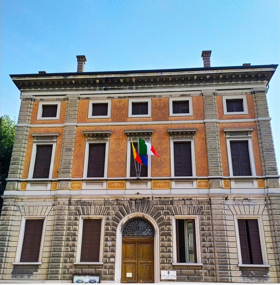 facciata esterna Conservatorio Giuseppe Verdi Ravenna, via di Roma palazzo storico